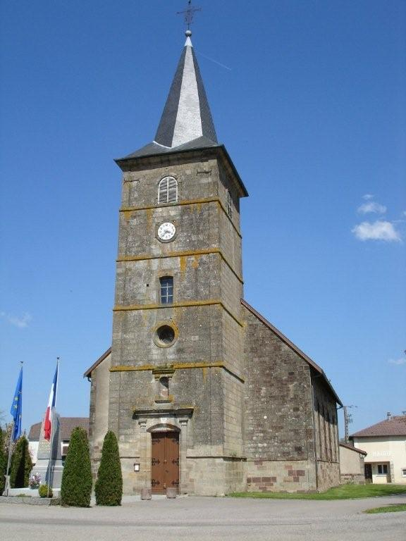 Église de Valfroicourt, village du département des Vosges, en France.